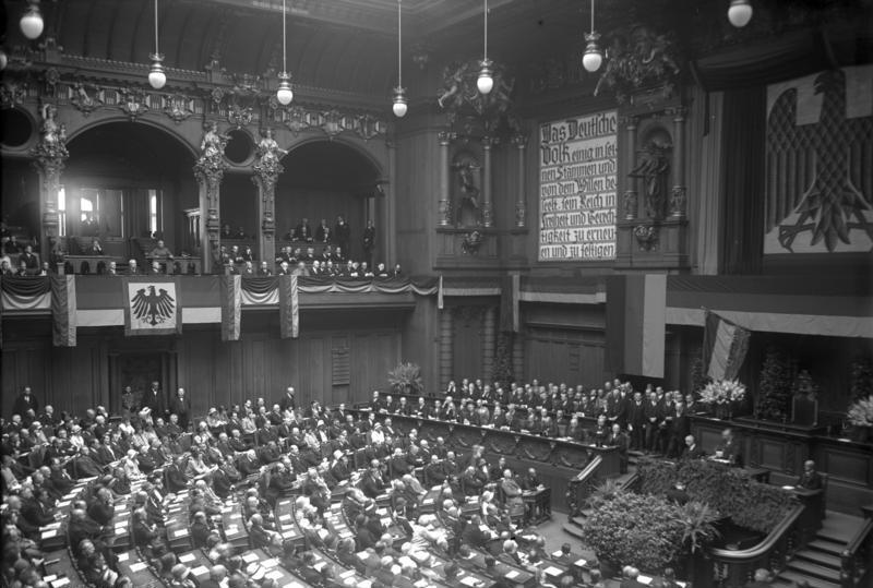 Die Verfassungsfeier der Reichsregierung im Reichstag in Berlin! Blick in den Reichstag während der Verfassungsrede des Reichsinnenministers Dr. Wirth. Links im Hintergrund die Präsidentenloge mit dem Reichspräsidenten von Hindenburg.